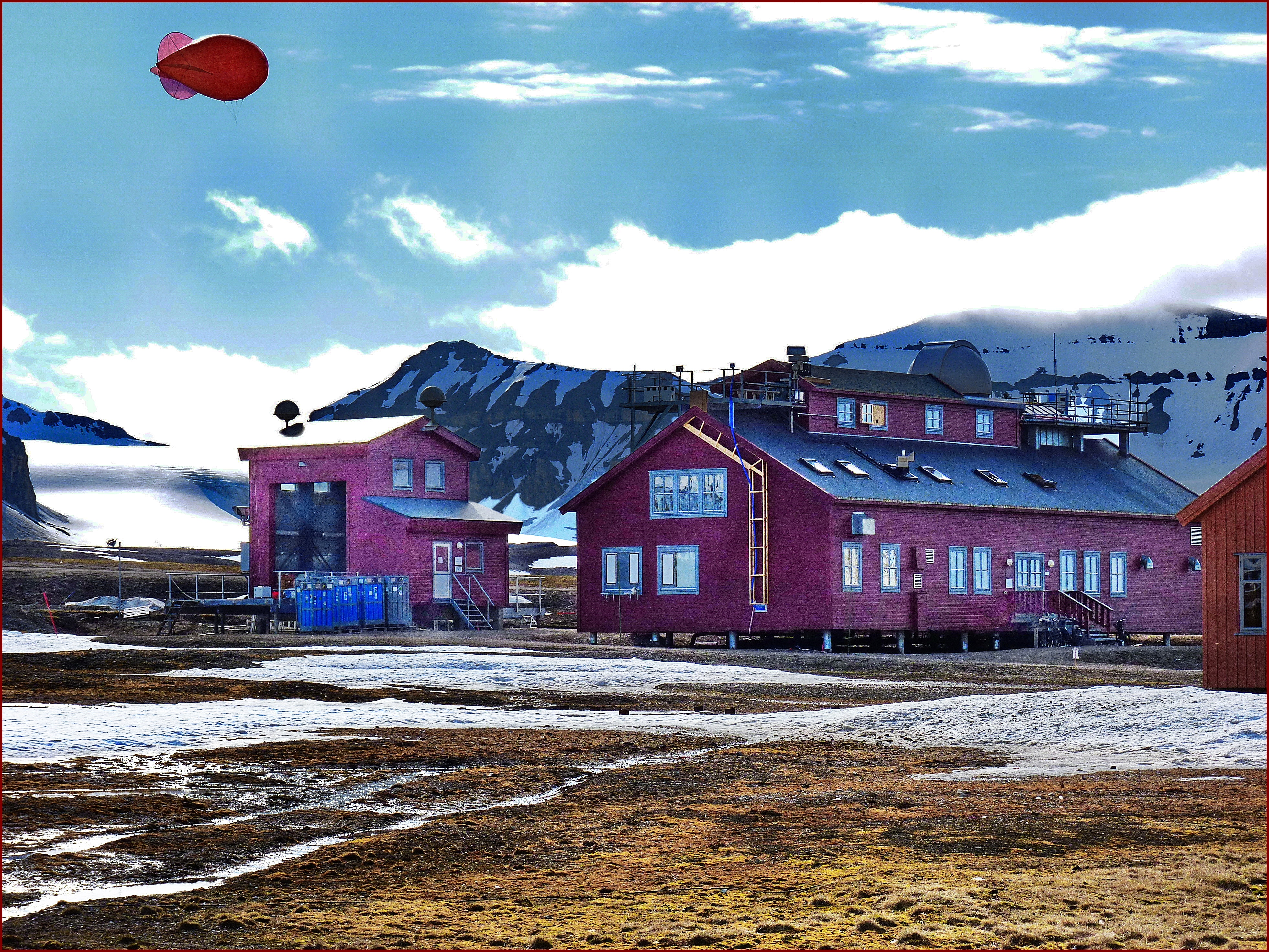 international meteorological center